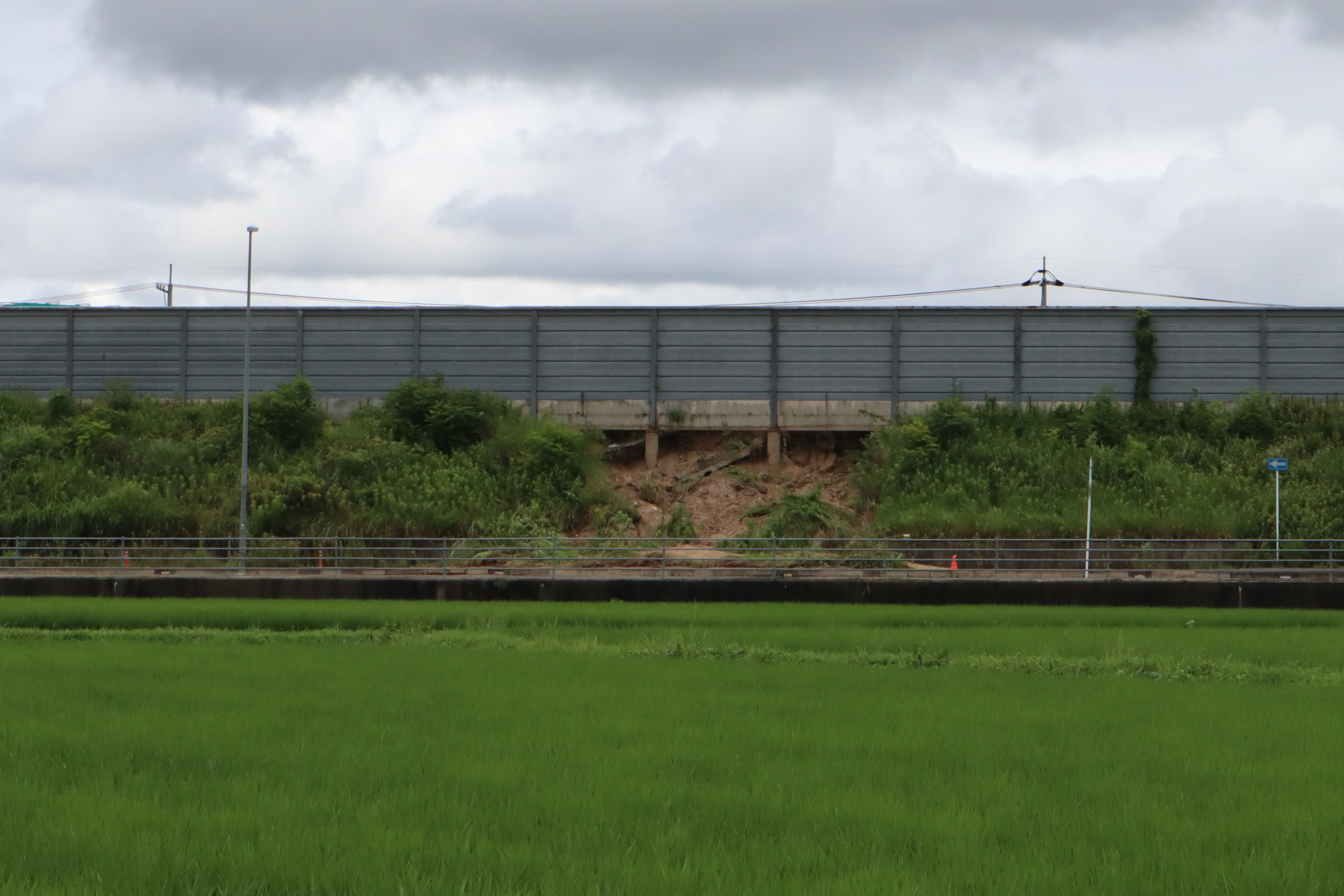 2018年7月7日。東広島市西条町御薗宇付近。国道2号線西条バイパスのり面崩落現場。側道は通行止め。